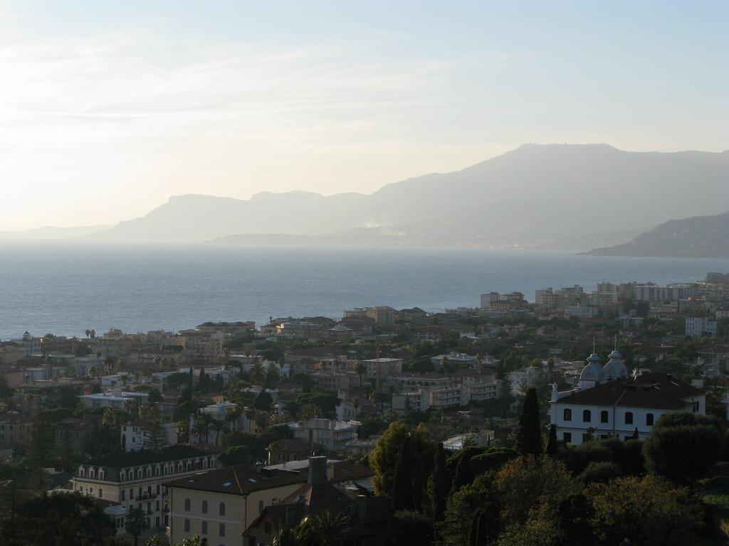 Panorama su Bordighera e costa francese, Liguria, Italy